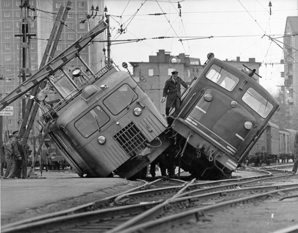 En Hilding Carlsson-rälsbuss, troligen av typ Yp, har kolliderat med en lokomotor typ Z6p på Stockholms Östra.